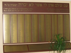 Šioje atminimo lentoje surašyti visi Kupiškio žydai, sušaudyti Antrojo pasaulinio karo metais.